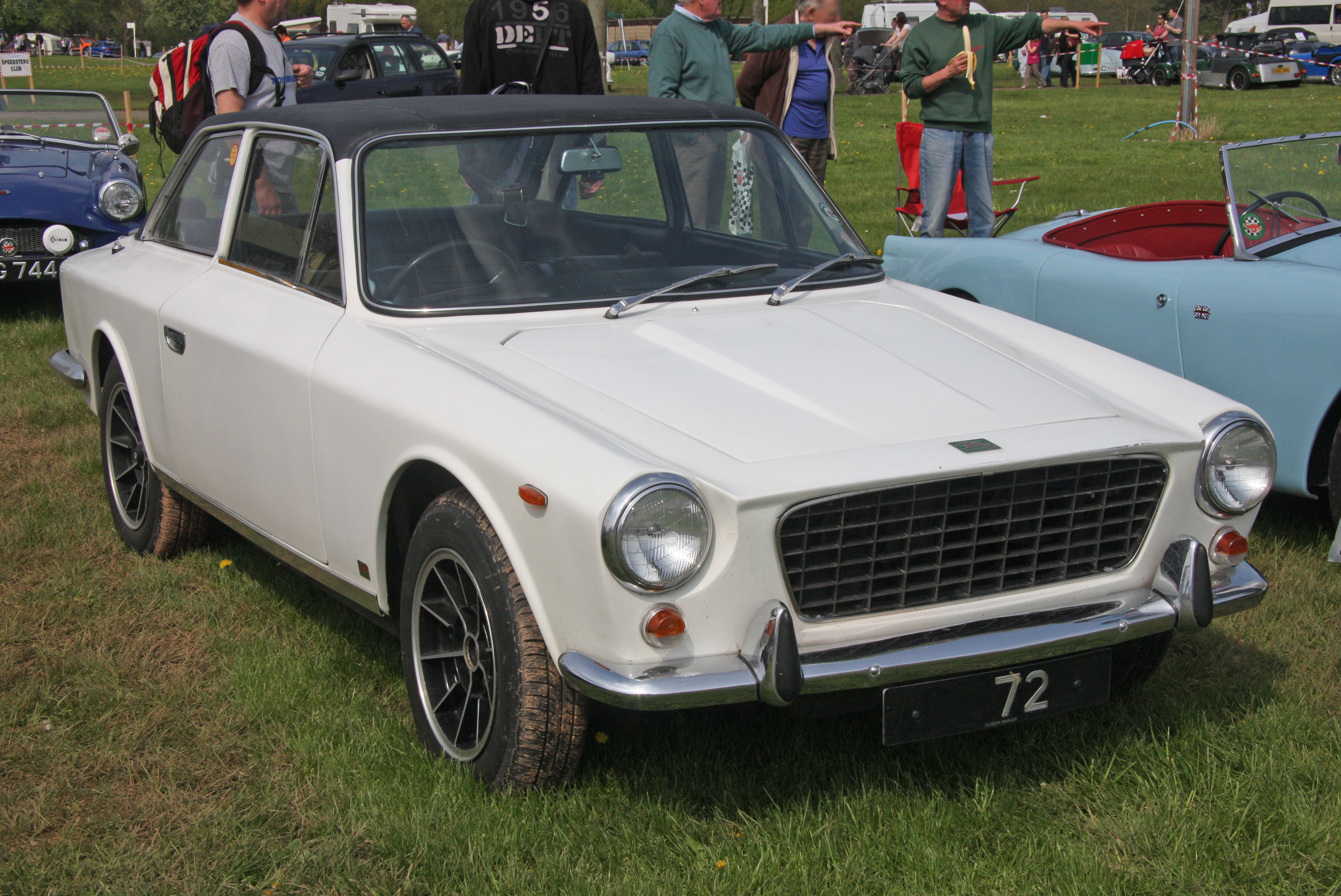 Gilbern Genie 1972 (late version)